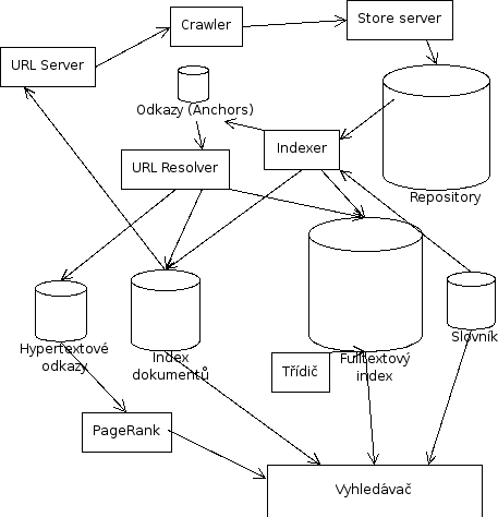 Struktura vyhledávače Google. Podle dokumentu The Anatomy of a Large-Scale Hypertextual Web Search Engine (Sergey Brin, Lawrence Page; Computer Networks and ISDN Systems, 30(1998), 107-117) namaloval che v programu Dia.